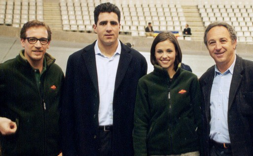 Carlos Beltrán, Miguel Indurain, Estela Giménez y Paco Fernández Ochoa en el velódromo Luis Puig de Valencia durante la grabación de un programa de Escuela del deporte en el año 2000.